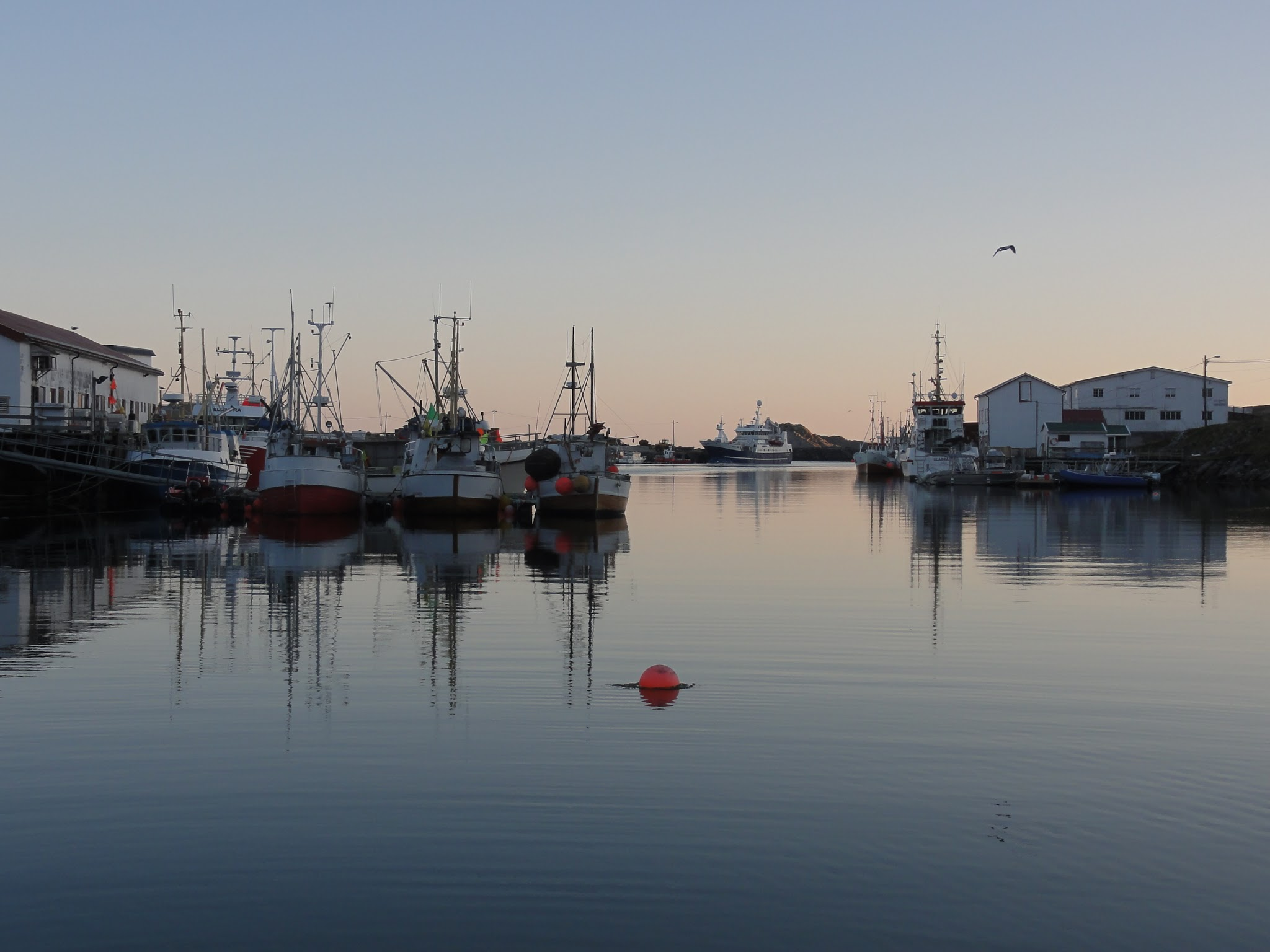 Sørvær, Sørøya, Nórsko, 2013